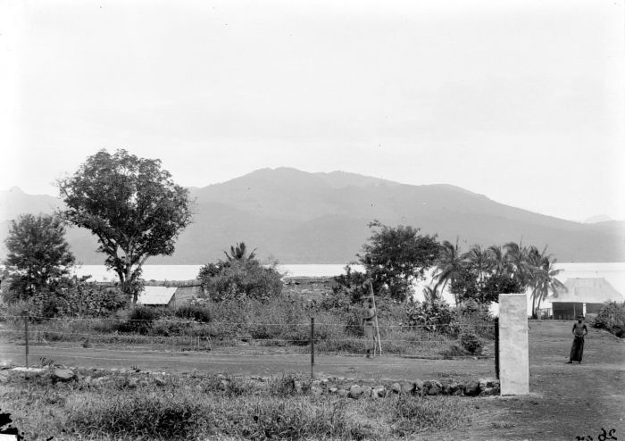 Negatief. Gezicht vanaf Larantoeka op het eiland Adonara